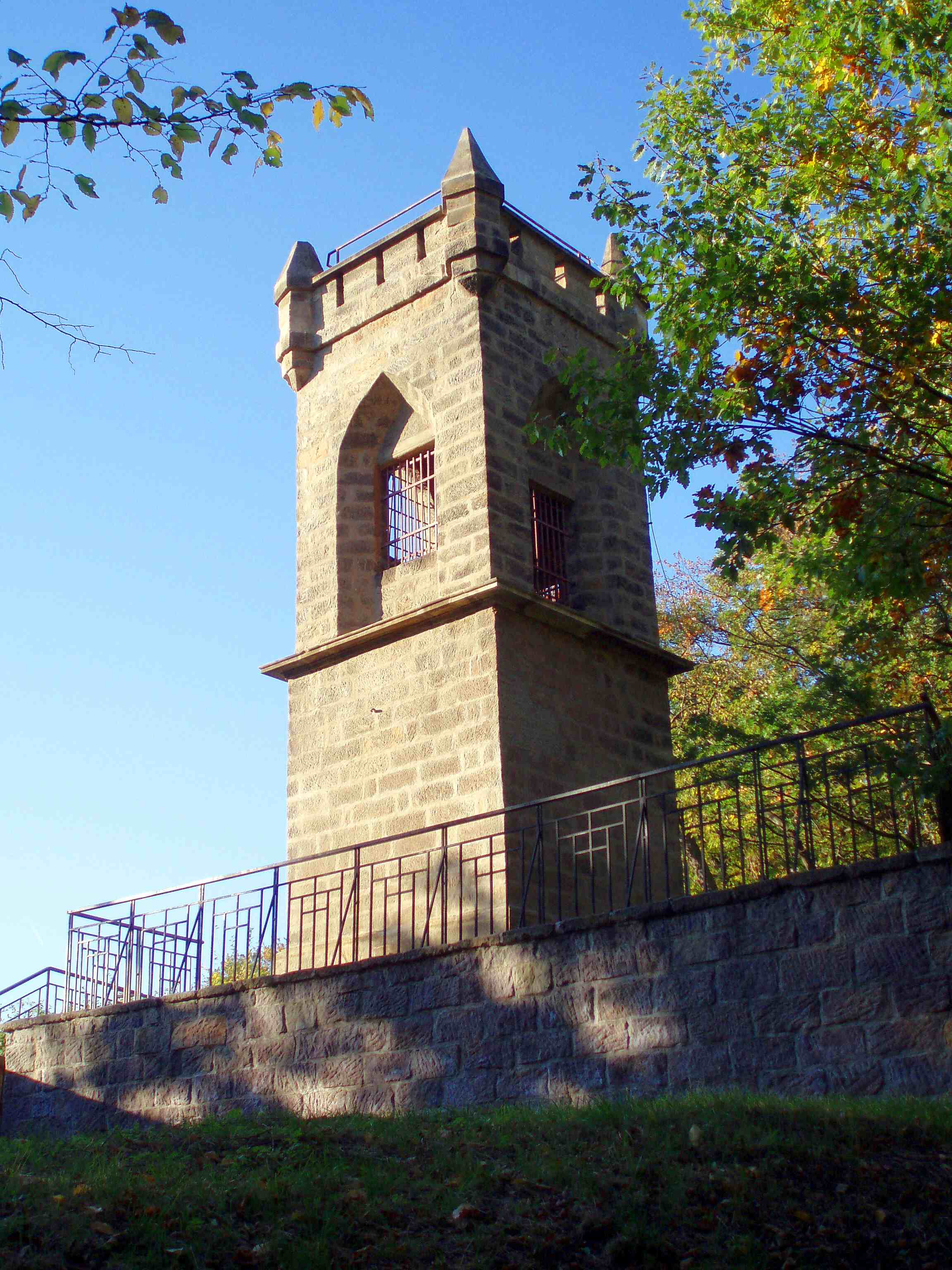 Aussichtsturm in Jicin